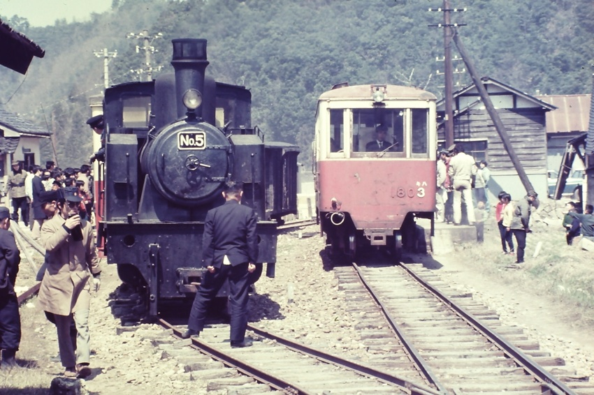 尾小屋鉄道